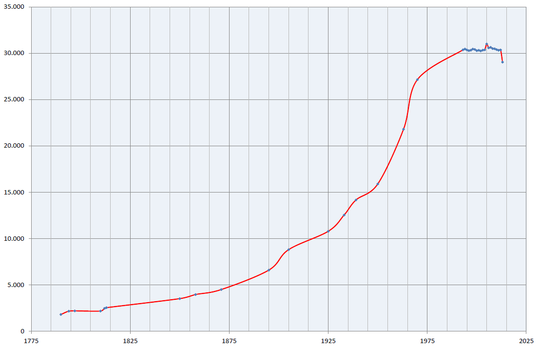 Bildbeschreibung: ...Diagramm Einwohnerentwicklung Andernach Zeichner: ...Maus-Trauden Datum: ...30.10.2005